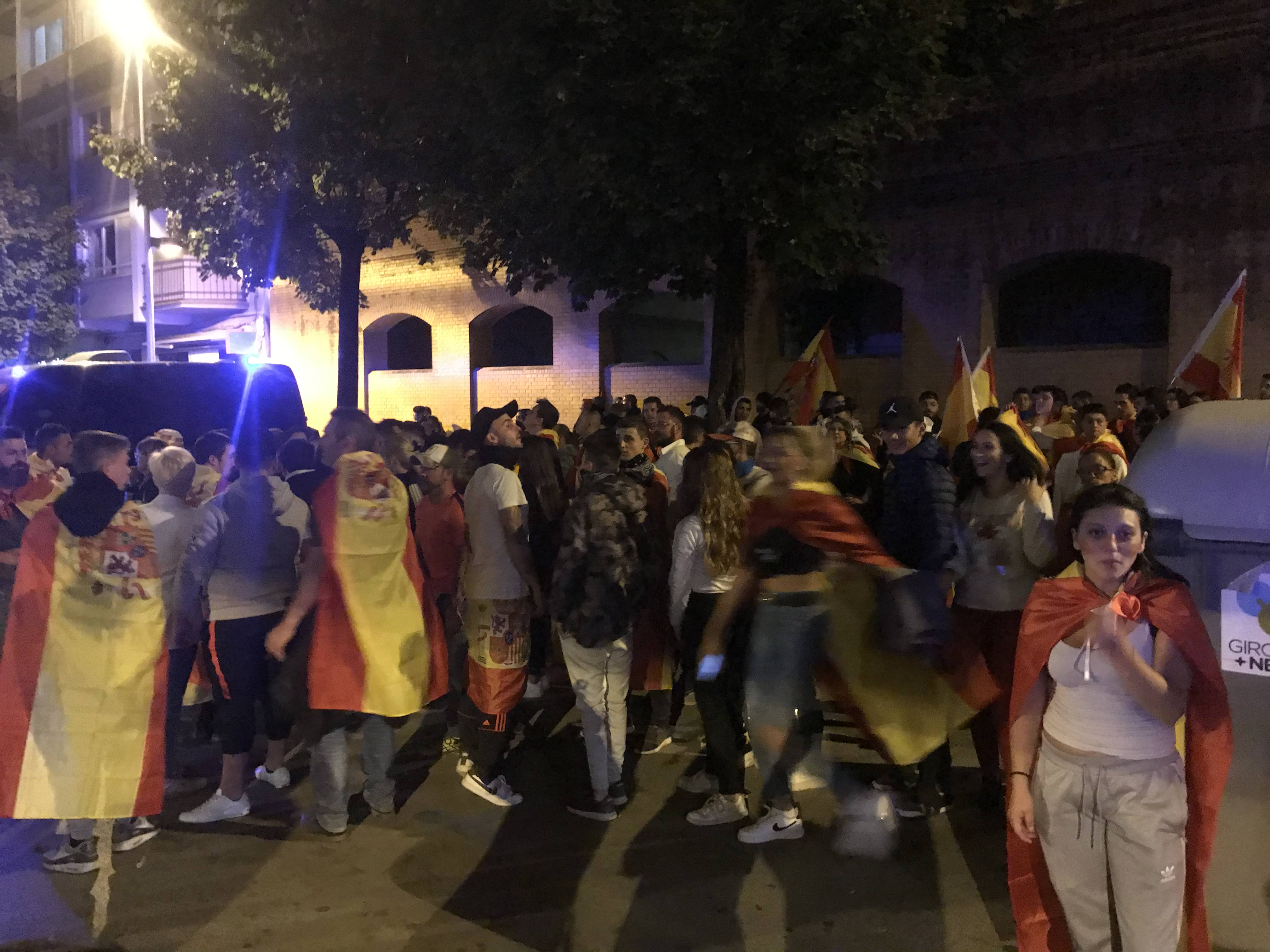 Vaga general del 18 d'octubre a Girona. Concentració de caire unionista al carrer Bonastruc de Porta, darrere de la subdelegació del govern central, encapsulats pels Mossos i la Policia Nacional